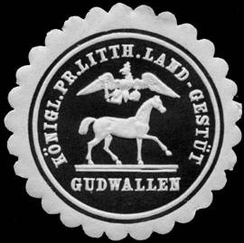 Sealing stamp Title: Königlich Preussisches Litthauisches Land-Gestüt - Gudwallen Description: schwarz, weiß, geprägt, Pferde Place: Gudwallen size: 4 cm